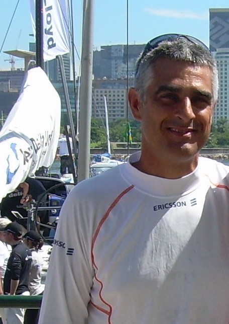 Horacio Carabelli. Ericsson 4. Volvo Ocean race 2008-09